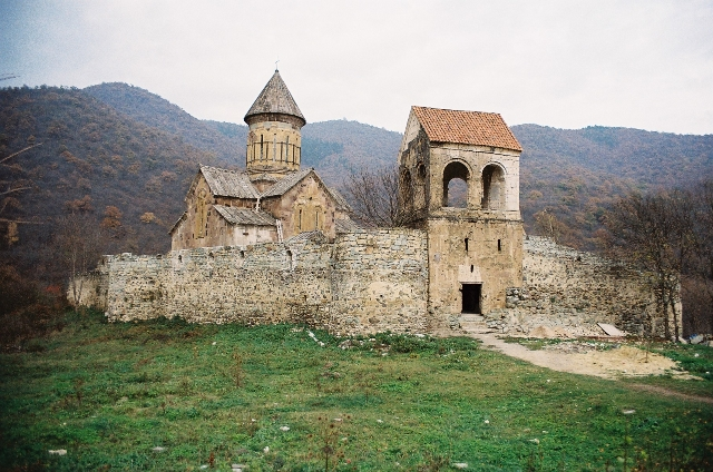 ფიტარეთი